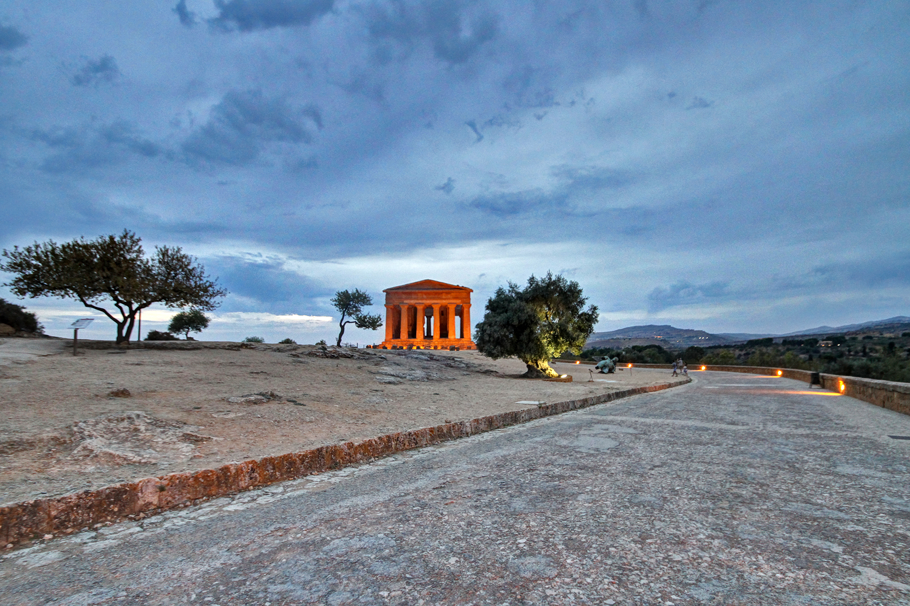 Valle dei Templi 3139